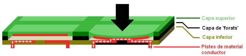 Diagrama estilitzat de teclat de membrana